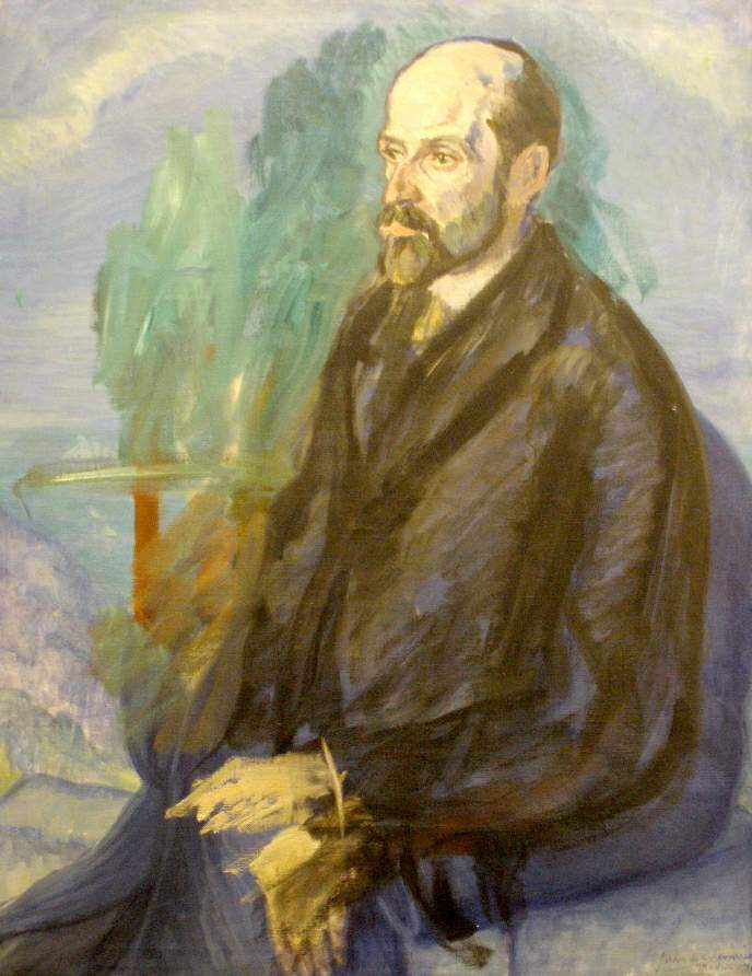 Vitoria - Museo de Bellas Artes de Álava, 'Juan Ramon Jimenez' (Juan de Echevarría, 1918)